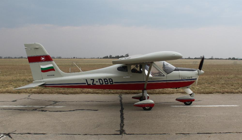 Tecnam P92 Echo, Rufzeichen LZ-DBB auf Taxiway bei der BIAF Airshow 2011 in Plovdiv